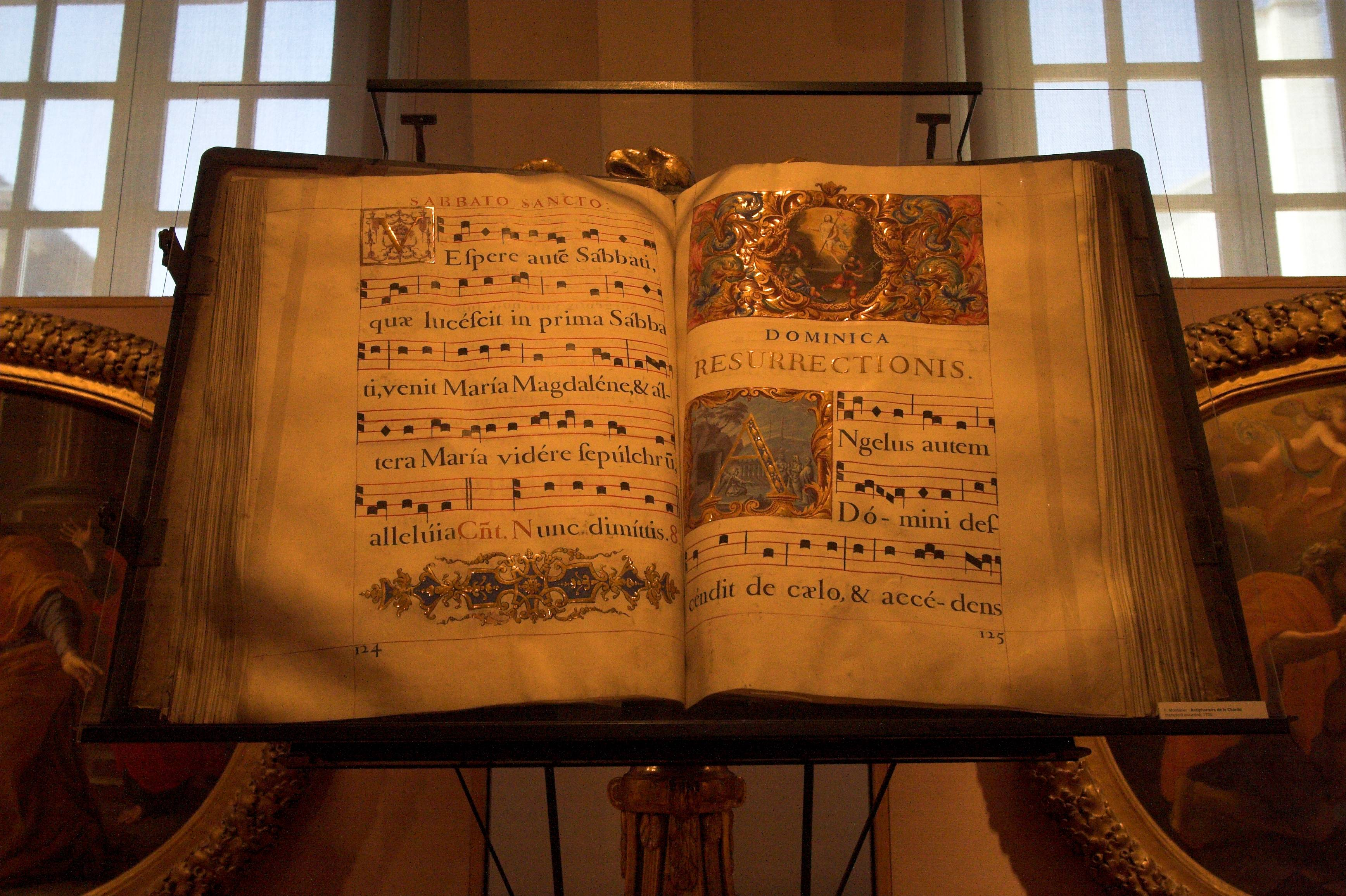 F. Montacier / Antiphonaire de la Charité / Musée de l'Assistance Publique-Hopitaux de Paris / Hôtel de Miramion (Paris, France). Recueil de chants liturgiques, 18e siècle (env. 1700), parchemin